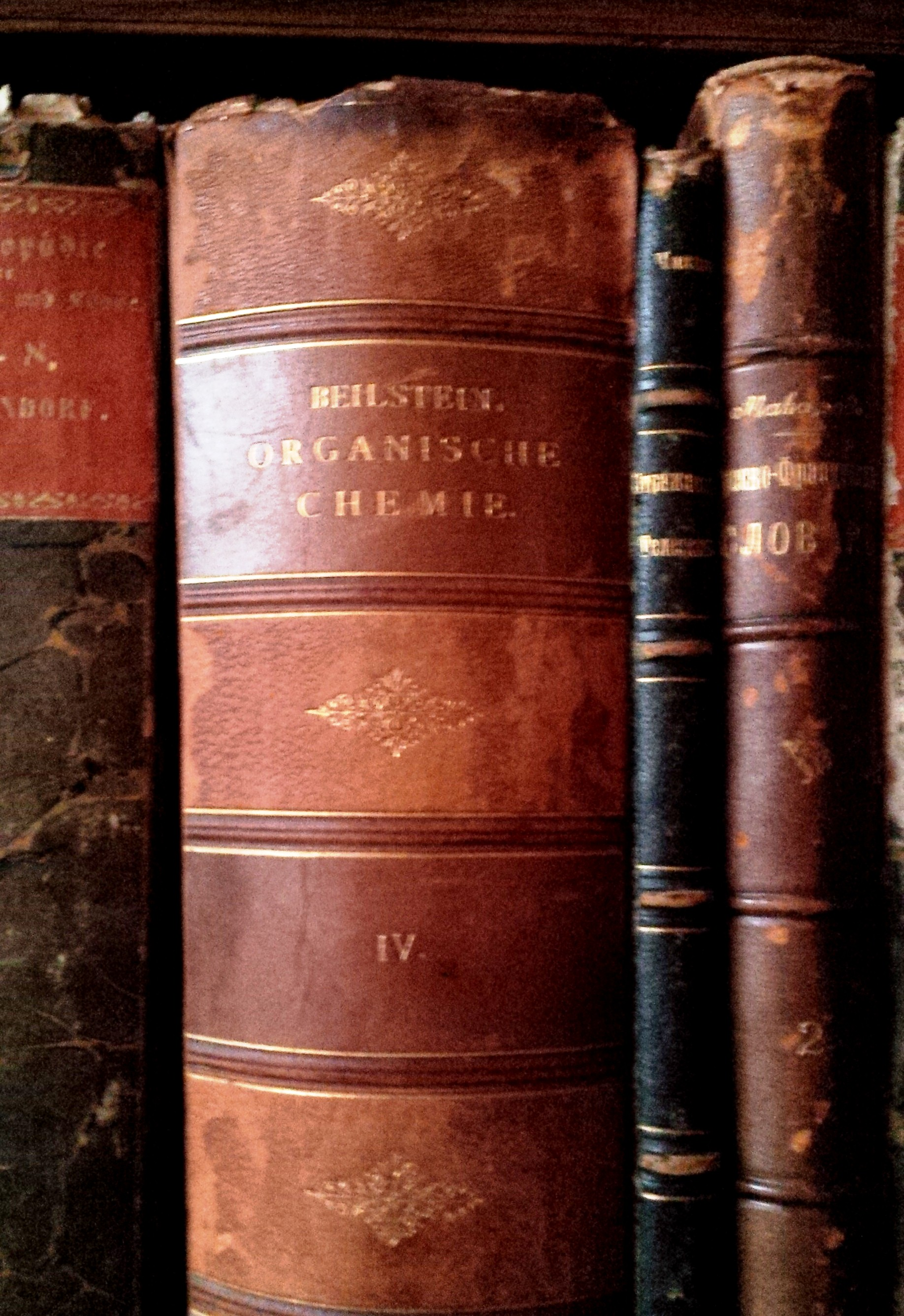 Beilsteins Handbuch der Organischen Chemie - im Kafe Puschkin in Moskau